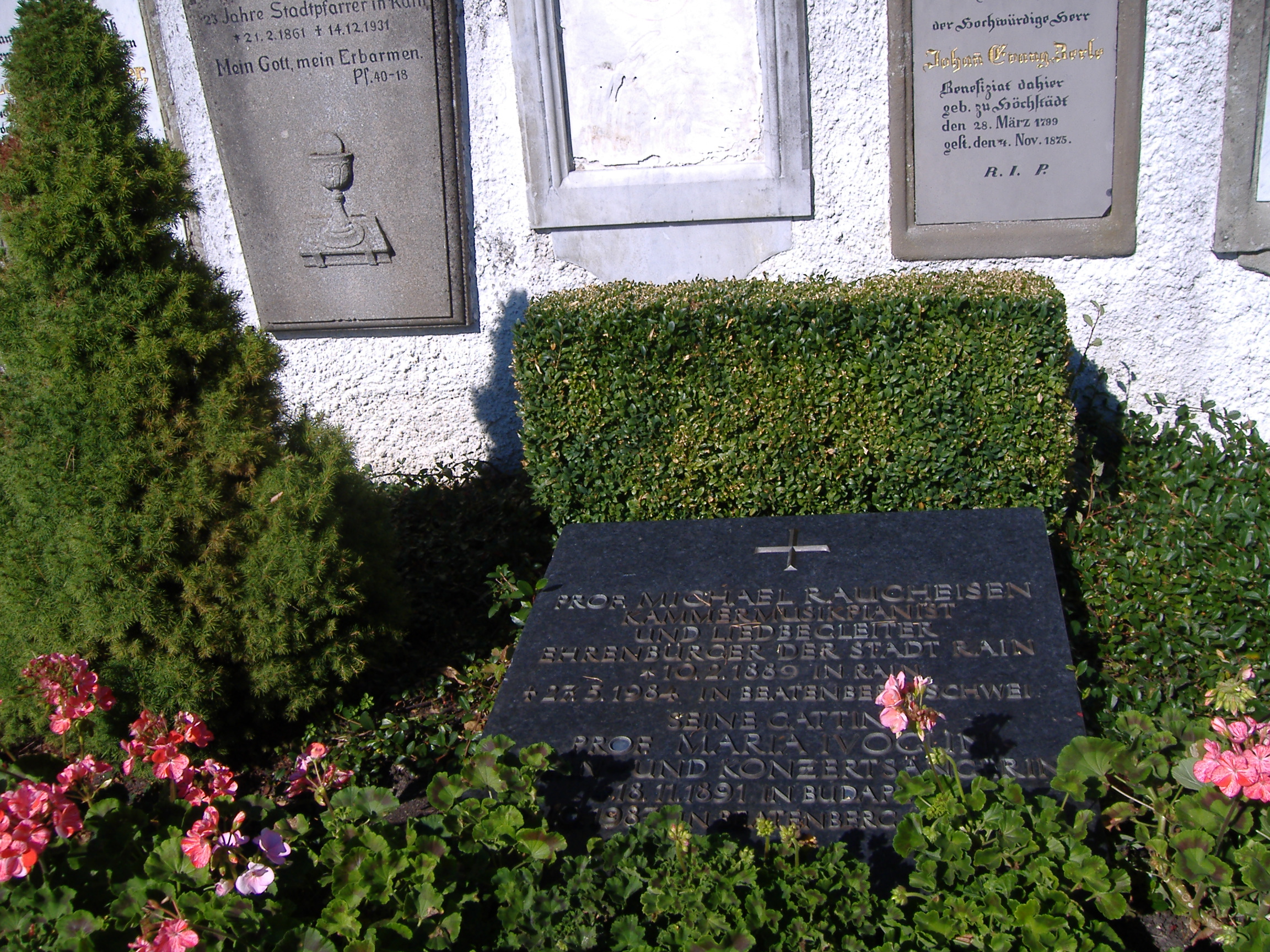 Grabstätte des Pianisten Michael Raueisen und dessen Frau